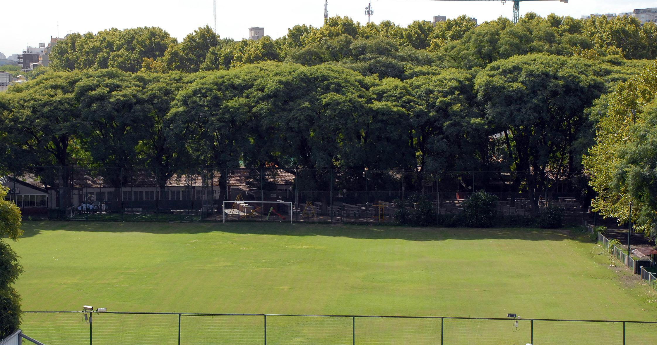 Cancha 3